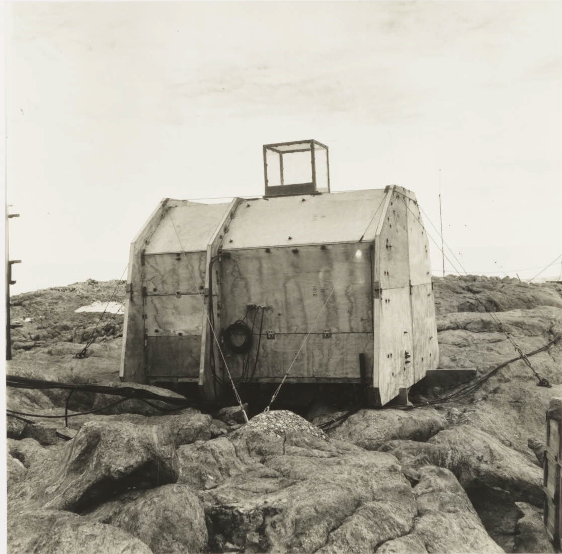 Abri observatoire en Terre Adélie, construit par les Expéditions polaires françaises.